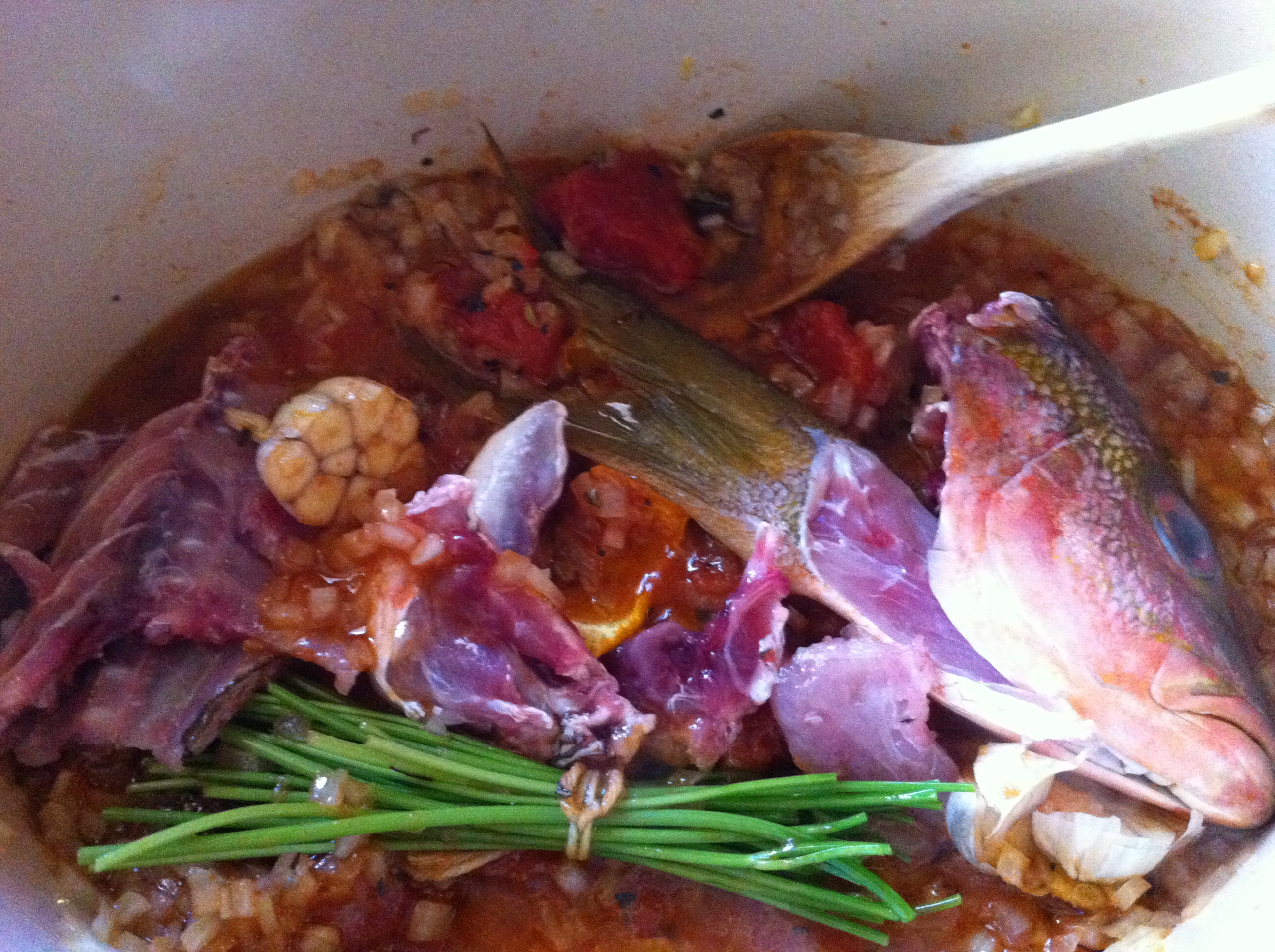 Soupe de poisson en cuisson